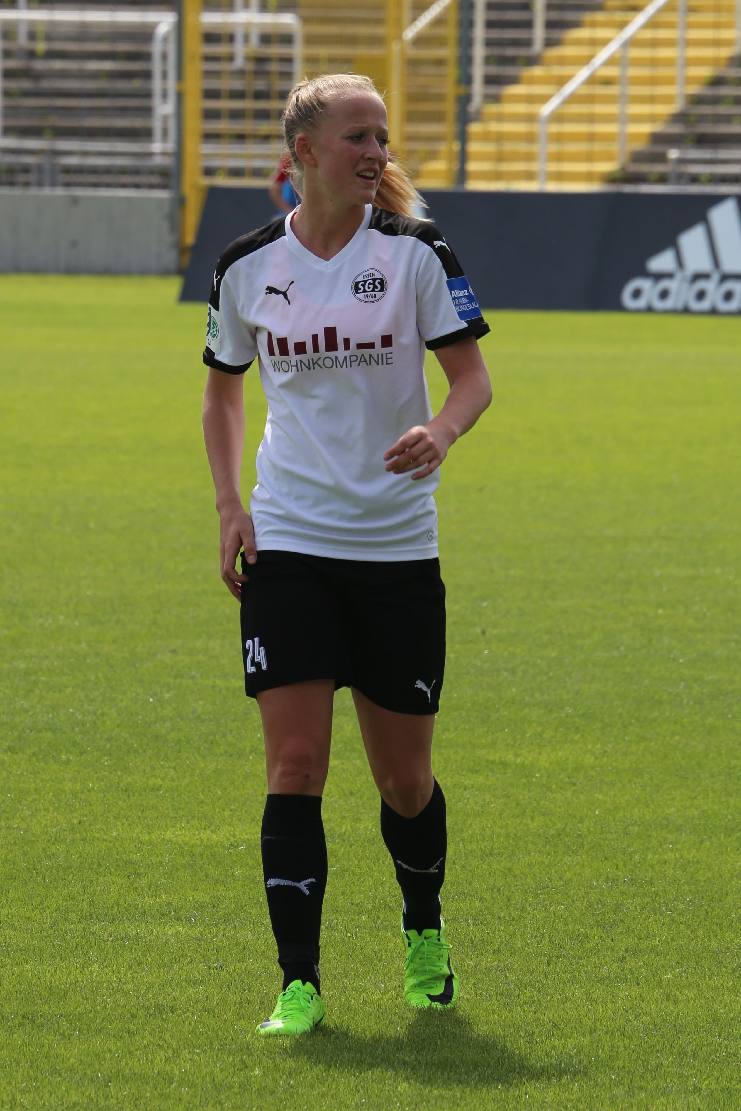 Lea Schüller (SGS Essen) beim Frauen-Bundesliga-Spiel FC Bayern München gegen SGS Essen am 21. Mai 2017 im Stadion an der Grünwalder Straße (Ergebnis war 2:0)